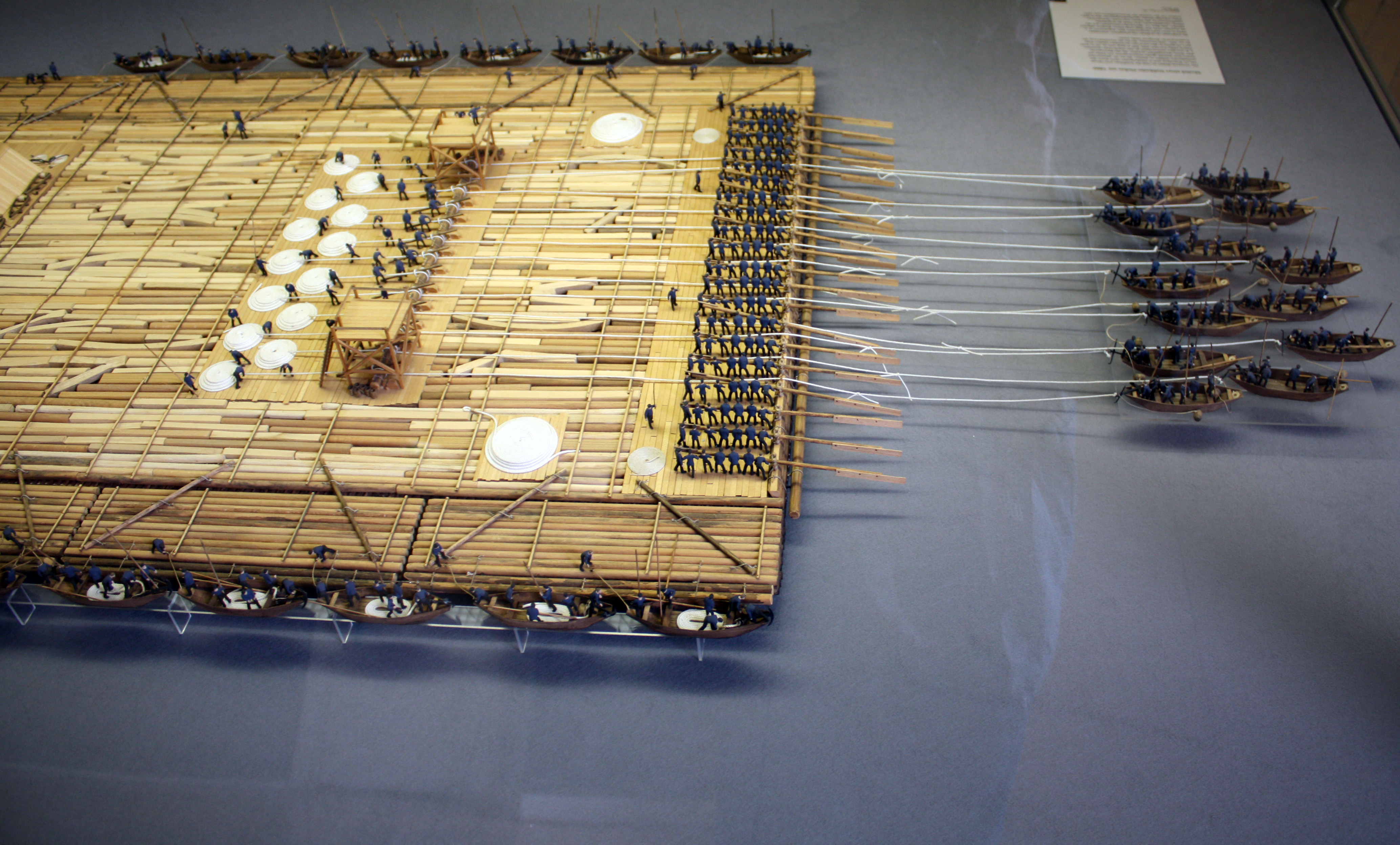 Holztransport auf dem Rhein im Modell. Stadtmuseum Zeughaus, Köln